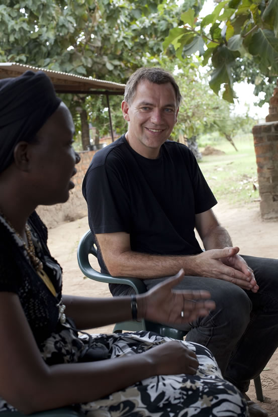 Das Foto zeigt Jan van Aken im Gespräch mit Milcah Lalam, der Leiterin des RECONCILE Friedensinstituts. RECONCILE ist eine sudanesische Nichtregierungsorganisation mit Sizt in Yei. Ziel des Friedensinsituts ist es, gewaltfreie und dialogorientierte Konfliktprävention zu vermitteln. Foto: DIE LINKE / Karin Desmarowitz